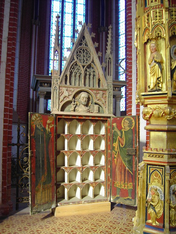 Kelchschrank (um 1300) geöffnet